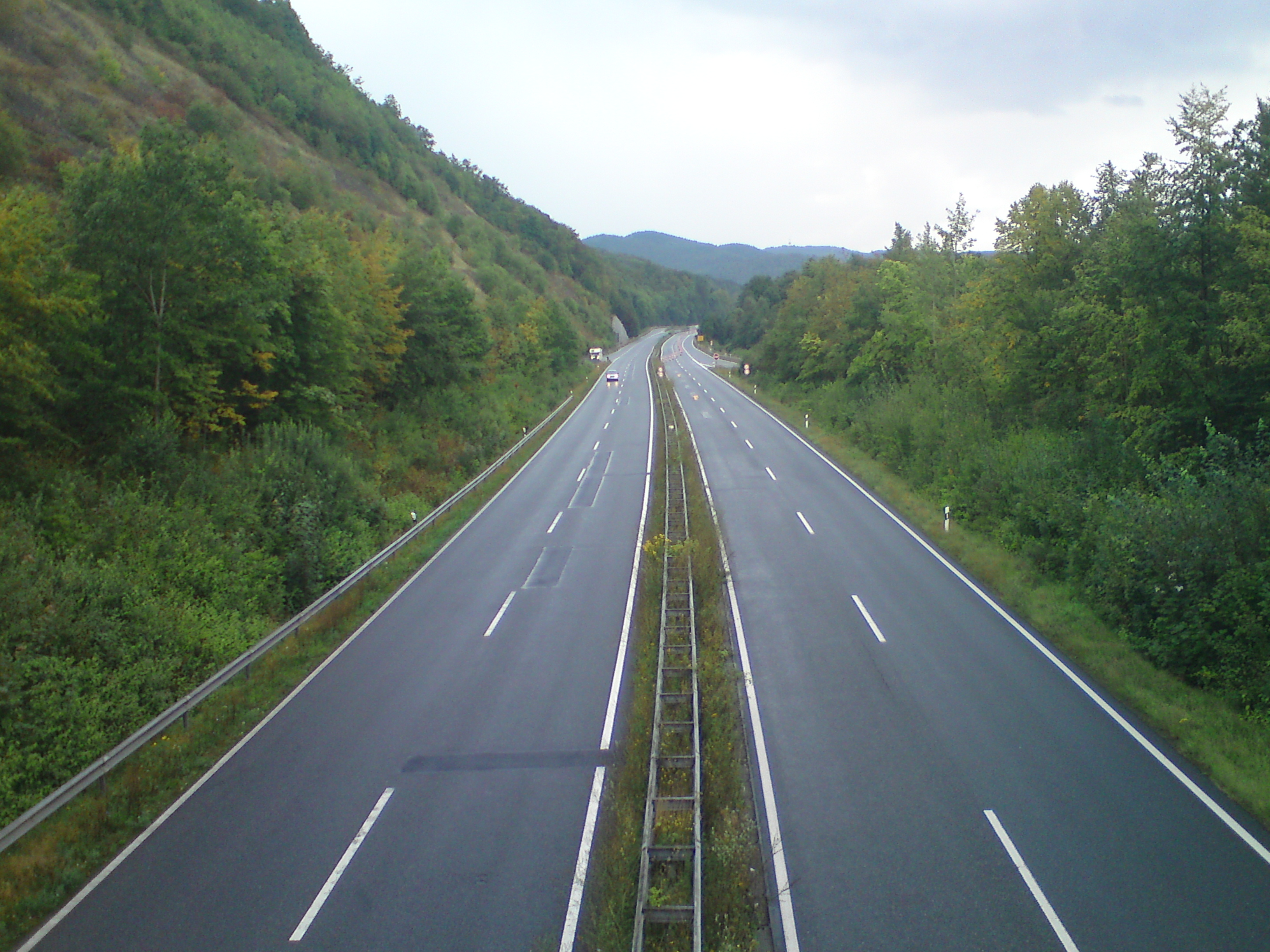 Der gemeinsame Verlauf der B 243 und der B 27 zwischen AS Barbis/Scharzfeld-Ost und der AS Bad Lauterberg-West, Blick in Fahrtrichtung Braunlage/Nordhausen